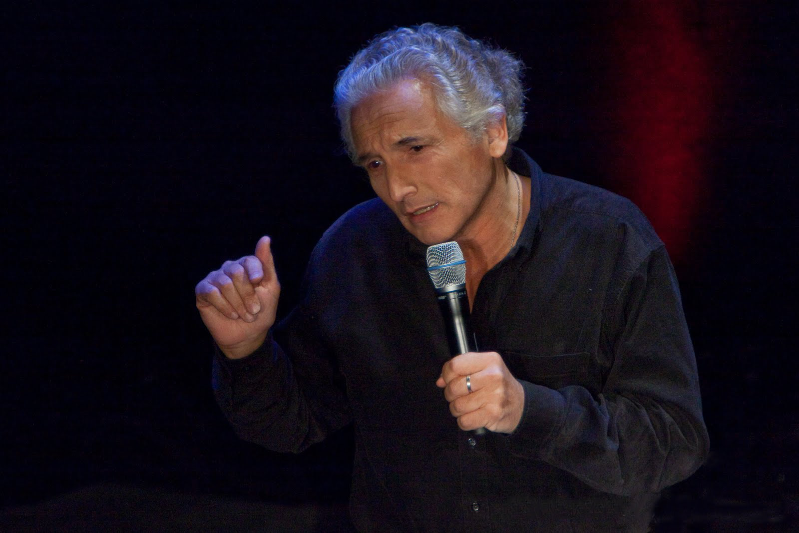 Miquel Benasayag lors de la conférence TEDx Paris 2010